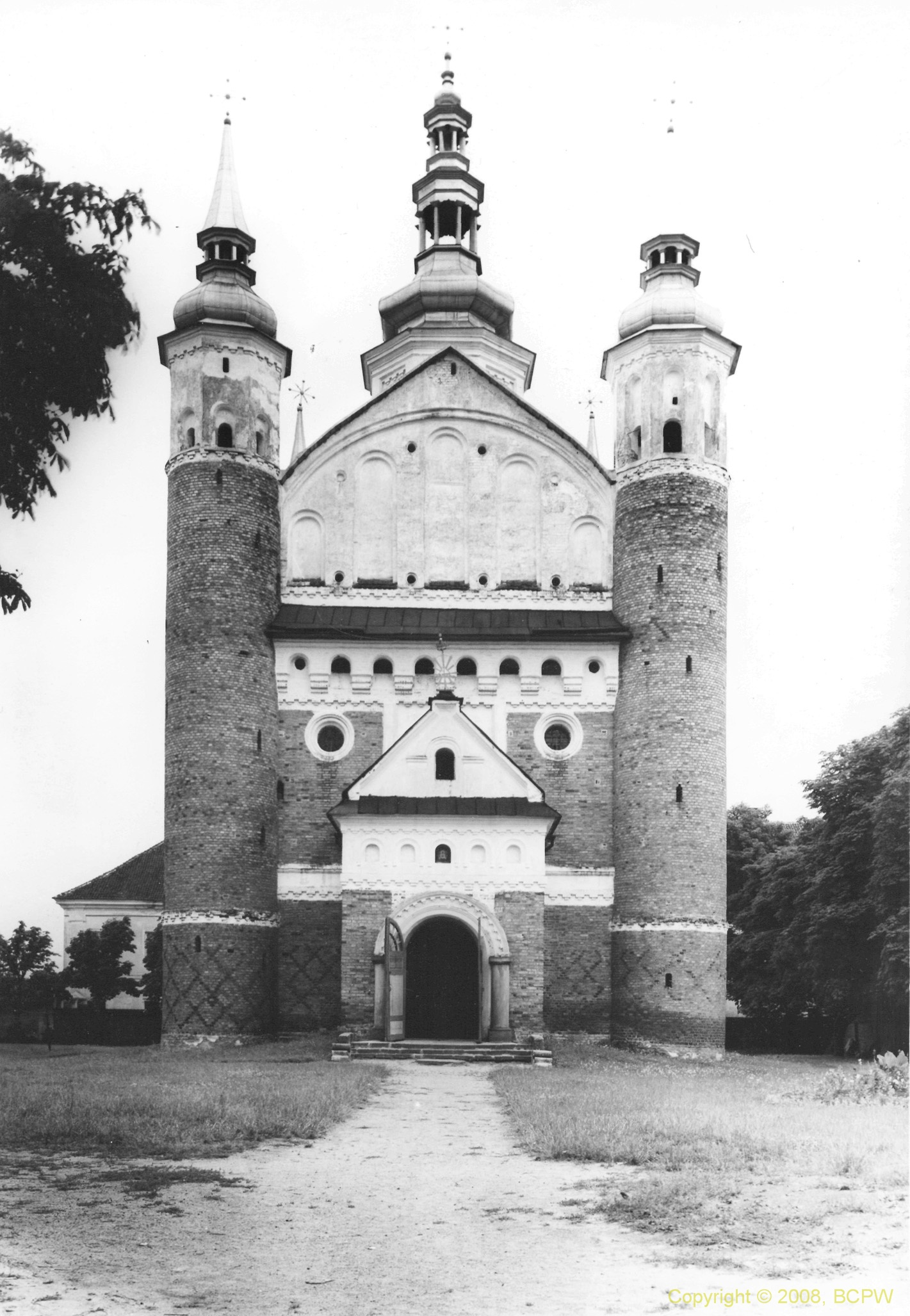 Cerkiew bazylianów Zwiastowania Najświętszej Marii Panny w Supraślu.